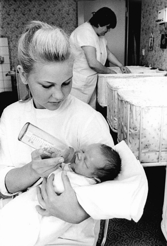 Schwerin, Bezirkskrankenhaus, Neugeborenenstation ADN-ZB Pätzold Schwerin: Bezirkskrankenhaus- Mehr als 2 600 Babies erblicken jährlich im Schweriner Bezirkskrankenhaus das Licht der Welt. Auf der Neugeborenenstation sind die Kleinen bei Kinderkrankenschwester Dorothea Schlüter (r.) und Mandy Rost, Fachschülerin für Kinderkrankenpflege im zweiten Studienjahr vom ersten Tage an in den besten Händen. Das moderne Versorgungs- und Fortbildungszentrum bietet auch die Risikoschwangerschaften und -geburten optimale Bedingungen für Mutter und Kind. -siehe auch 1989-0921-12-14 N.